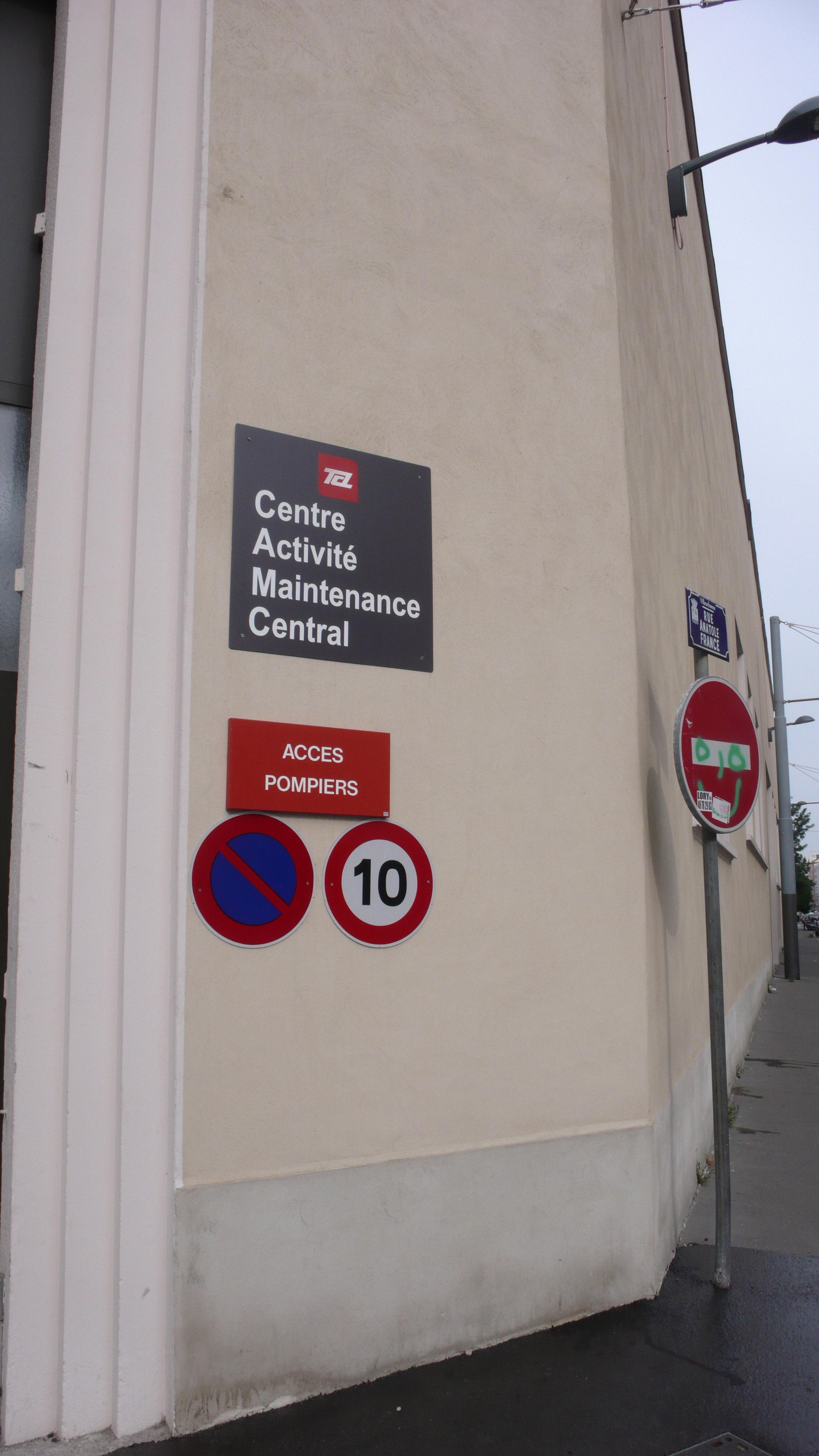 centro attività e manutenzione - TCL, F-69100 Villeurbanne